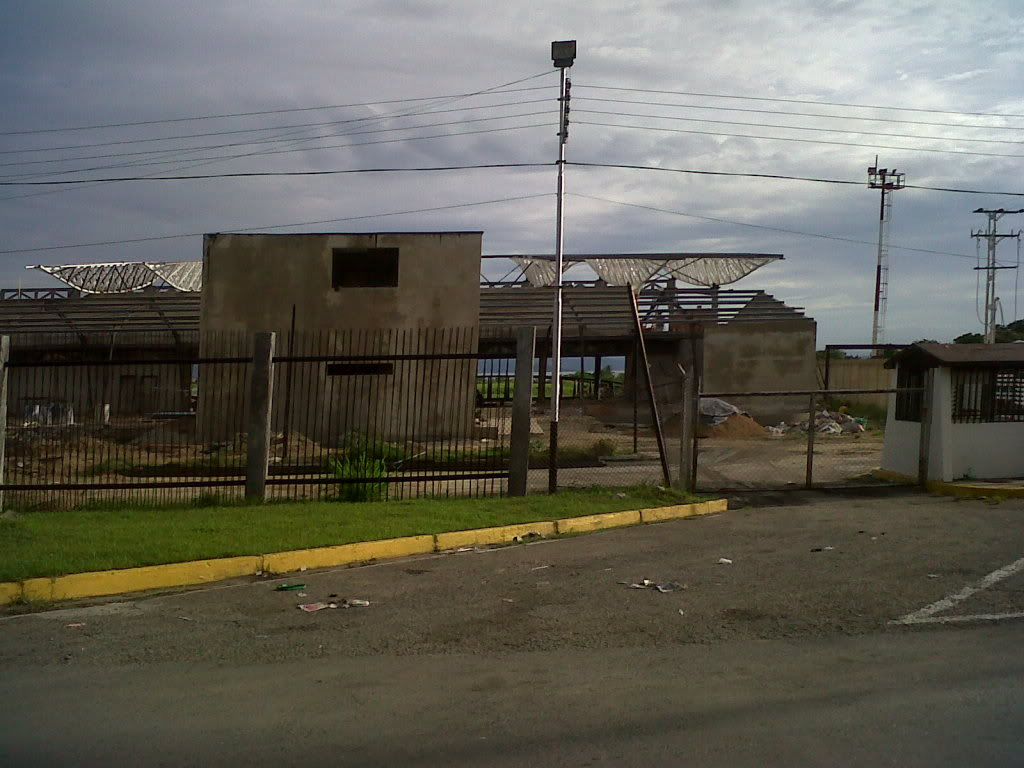 construccion aeropuerto nacional Florencio Gomez